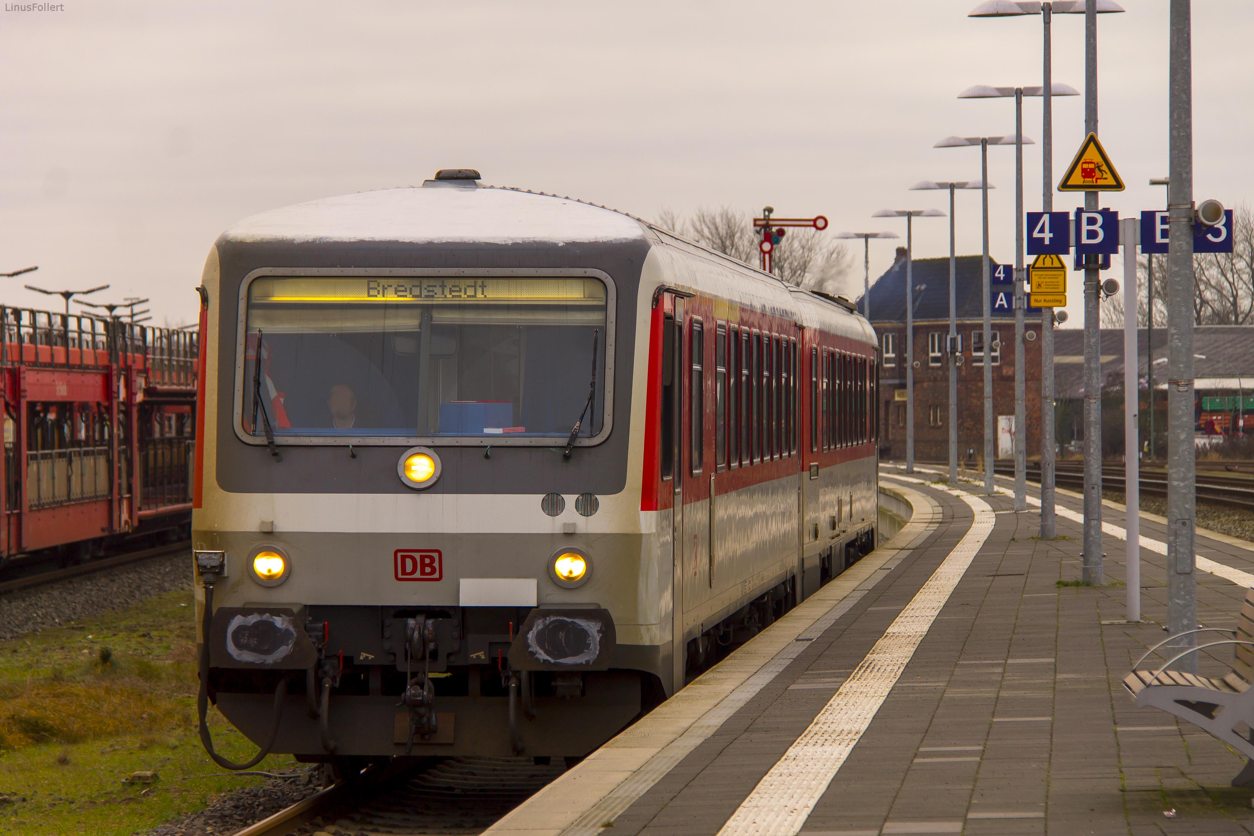 628 495 Sylt Shuttle Plus